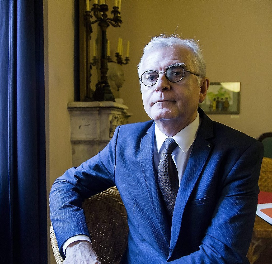 Traducteur, historien, auteur, chef de la mission communication et responsable du mécénat au ministère de la Culture et de la Communication